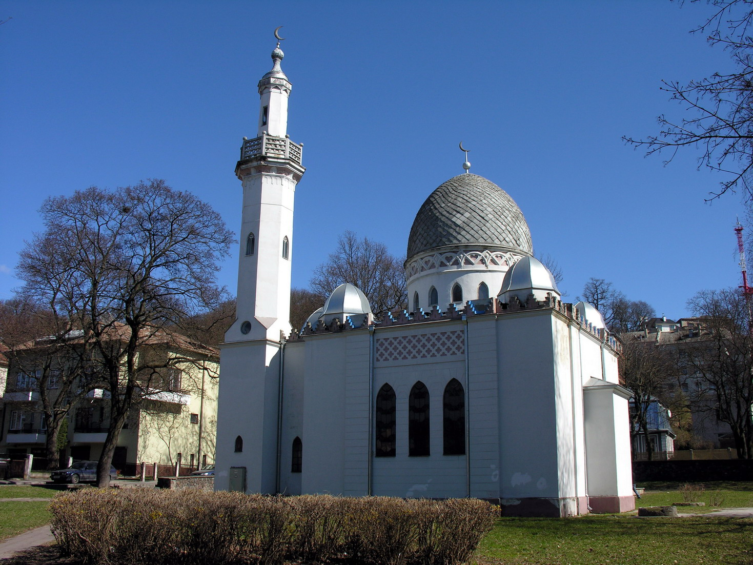 Kauno mečetė.